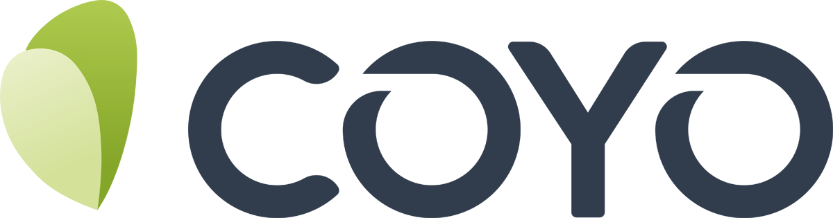 Logo der COYO GmbH